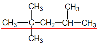 Alkane